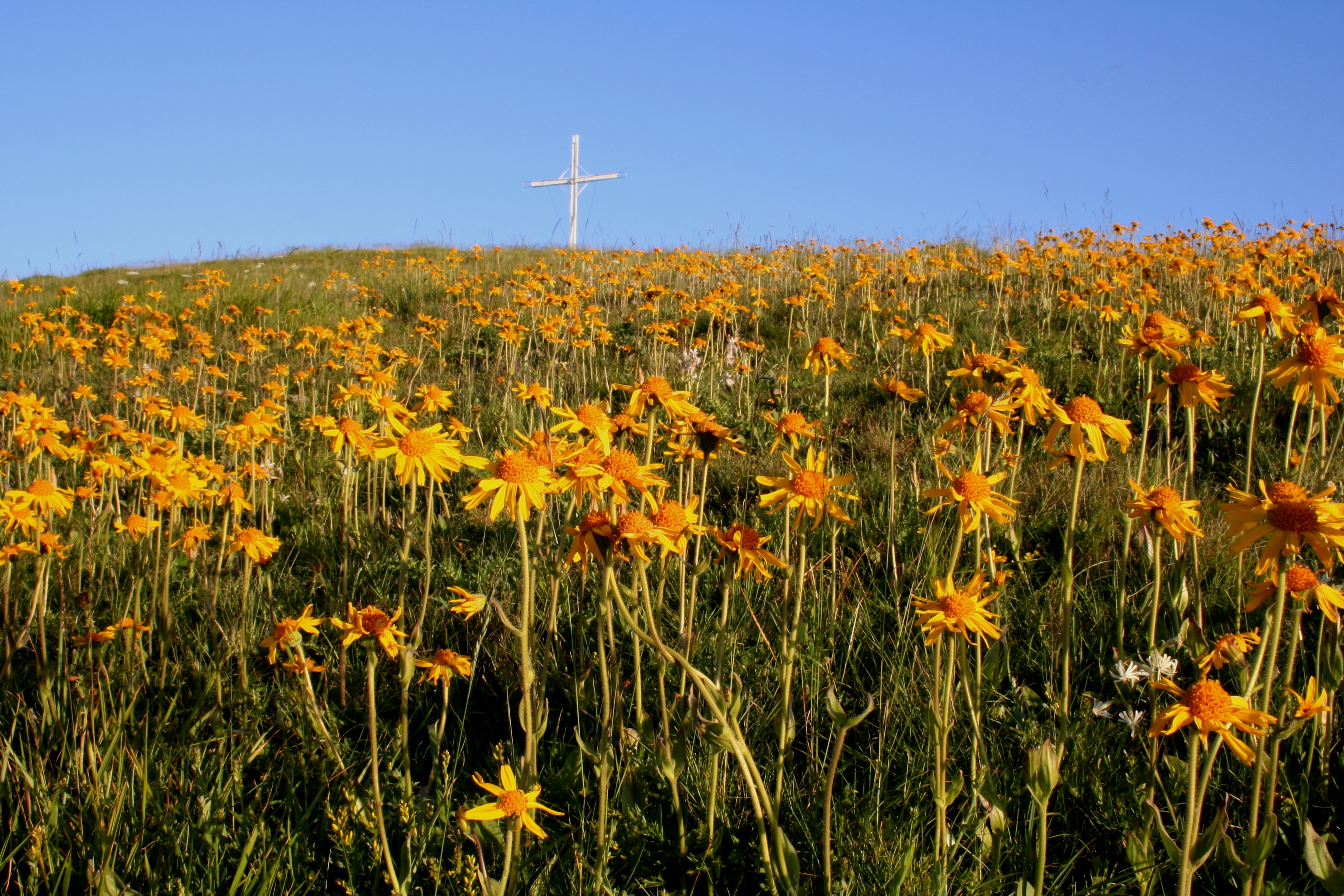 Fioritura di arnica sul Monte Antola (foto A.Federici)